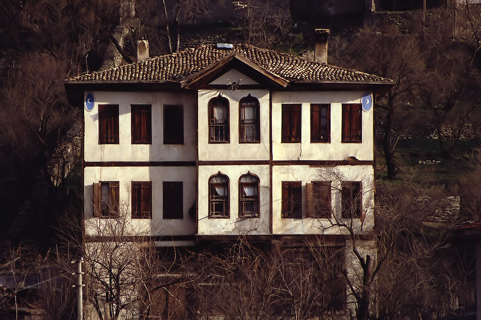 Safranbolu